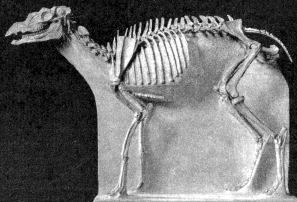 Protoceras celer skeleton, AMNH.